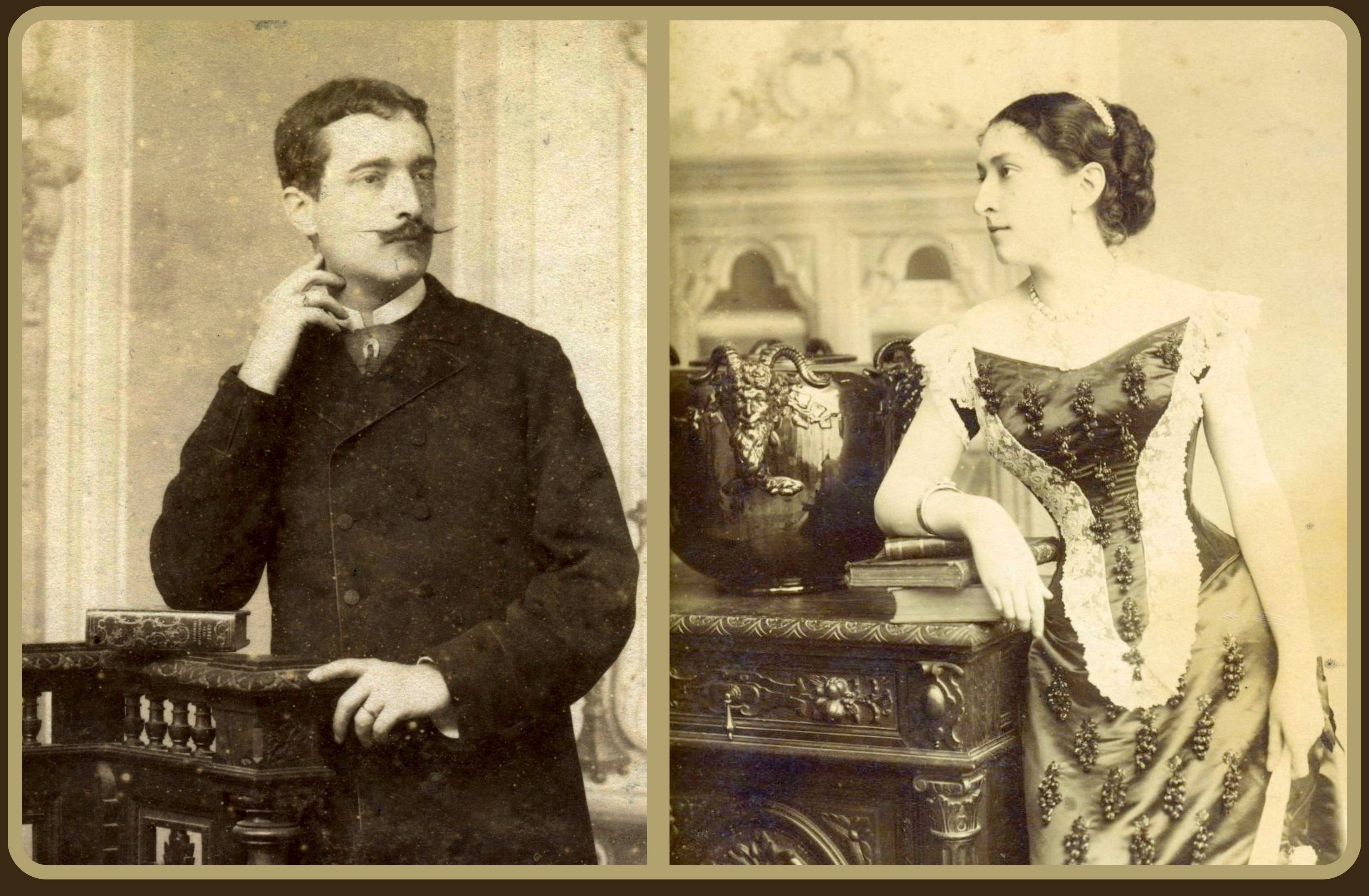 Portrait de Jeanne Bonaparte